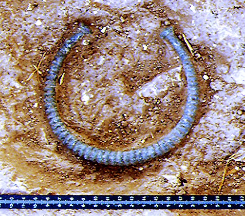 Torques de bronce celtibero hallado en Arguedas ( Navarra ) Por el Arqueologo Juanjo Bienes Calvo.